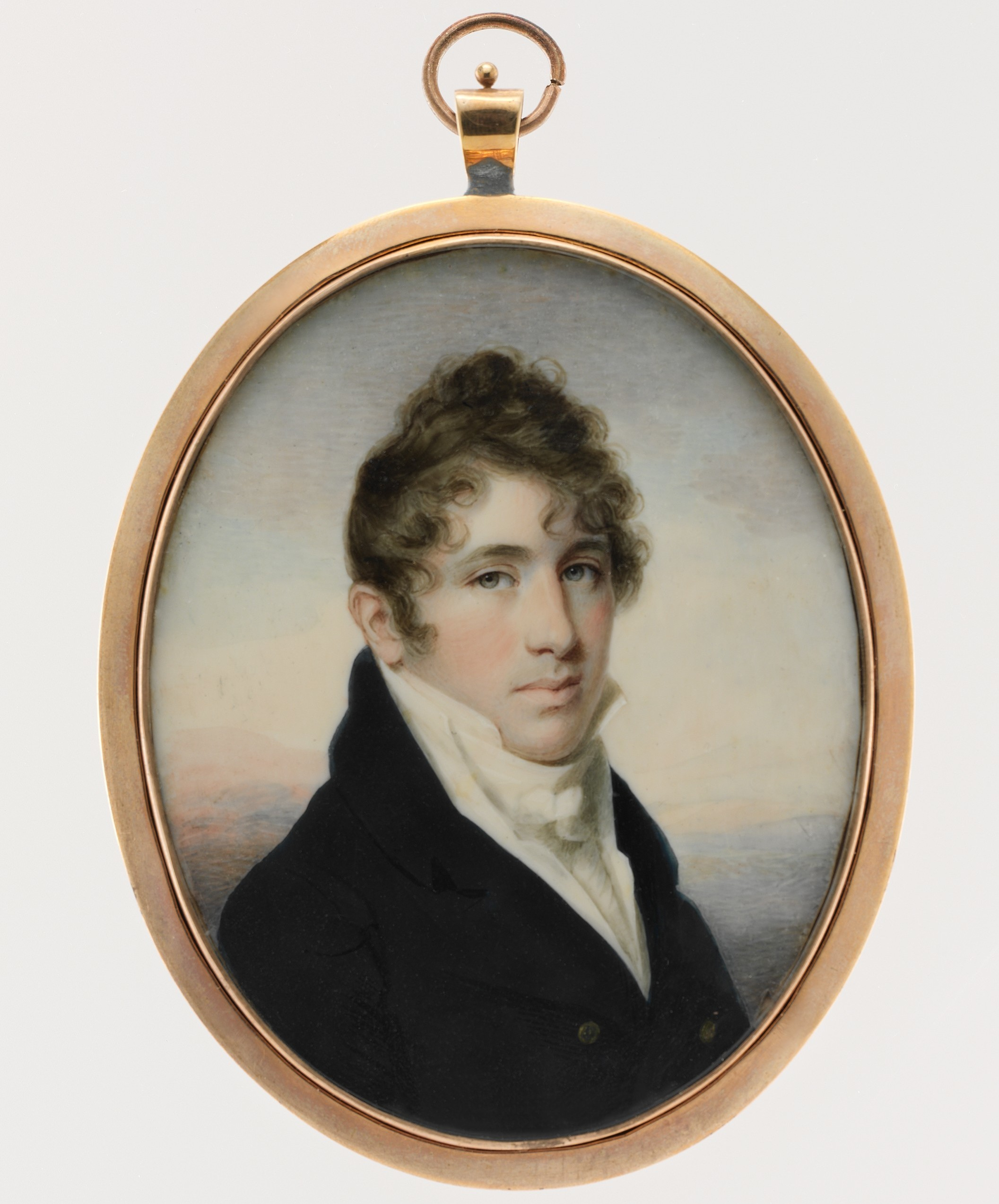 Painting, miniature; Paintings